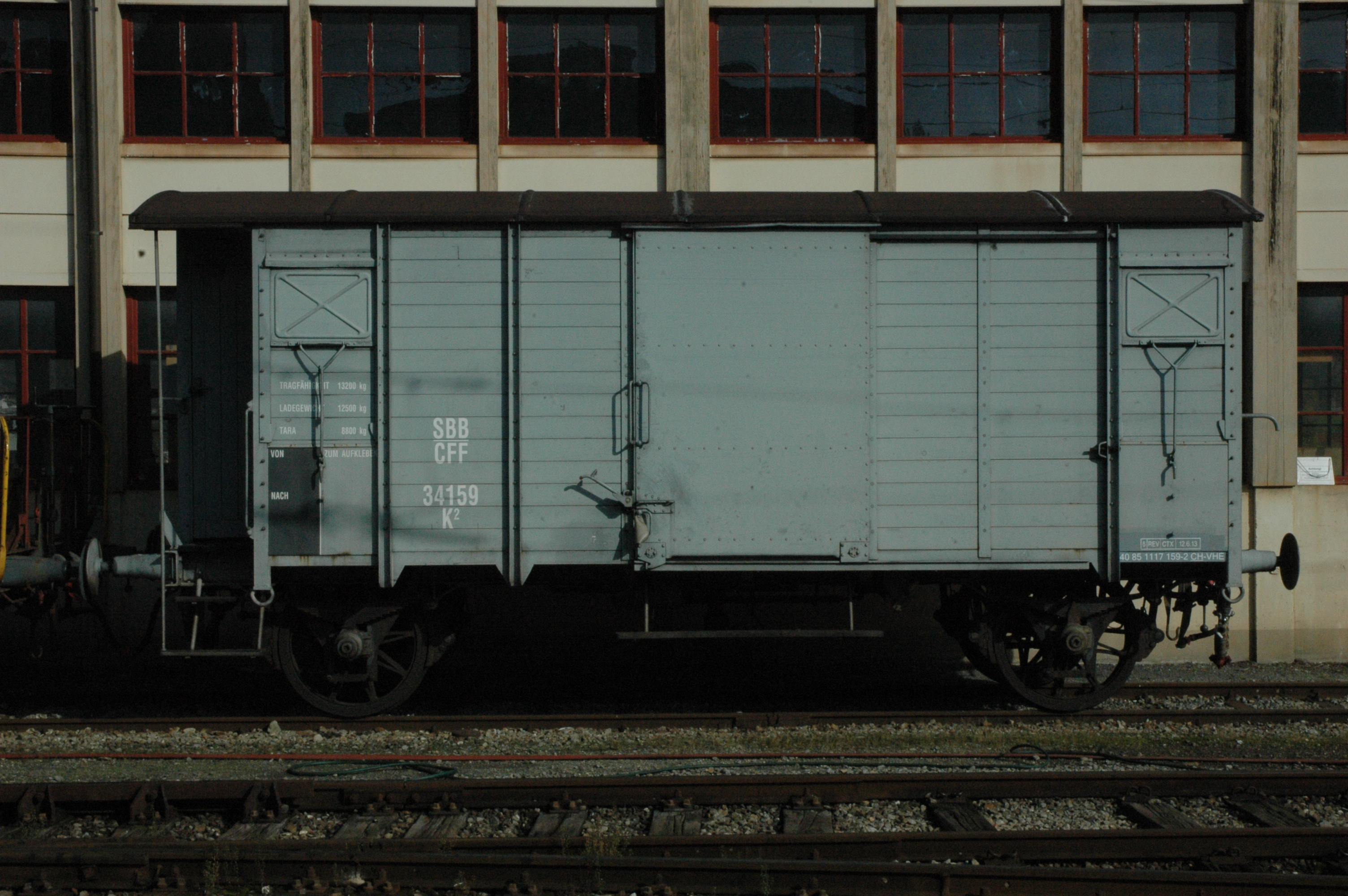 Güterwagen K2 des Vereins Historische Eisenbahn Emmental, in Huttwil